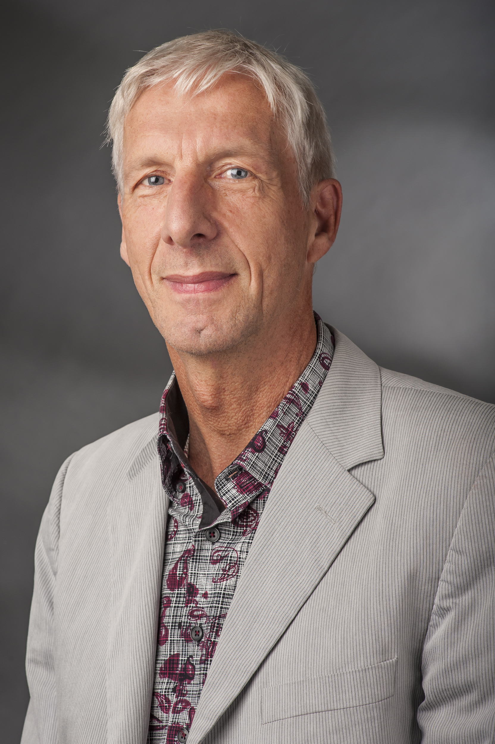 Herbert Behrens (* 30. Mai 1954 in Osterholz-Scharmbeck) ist ein deutscher Gewerkschafter und Politiker der Partei Die Linke. Seit 2009 ist er Mitglied des Deutschen Bundestages.